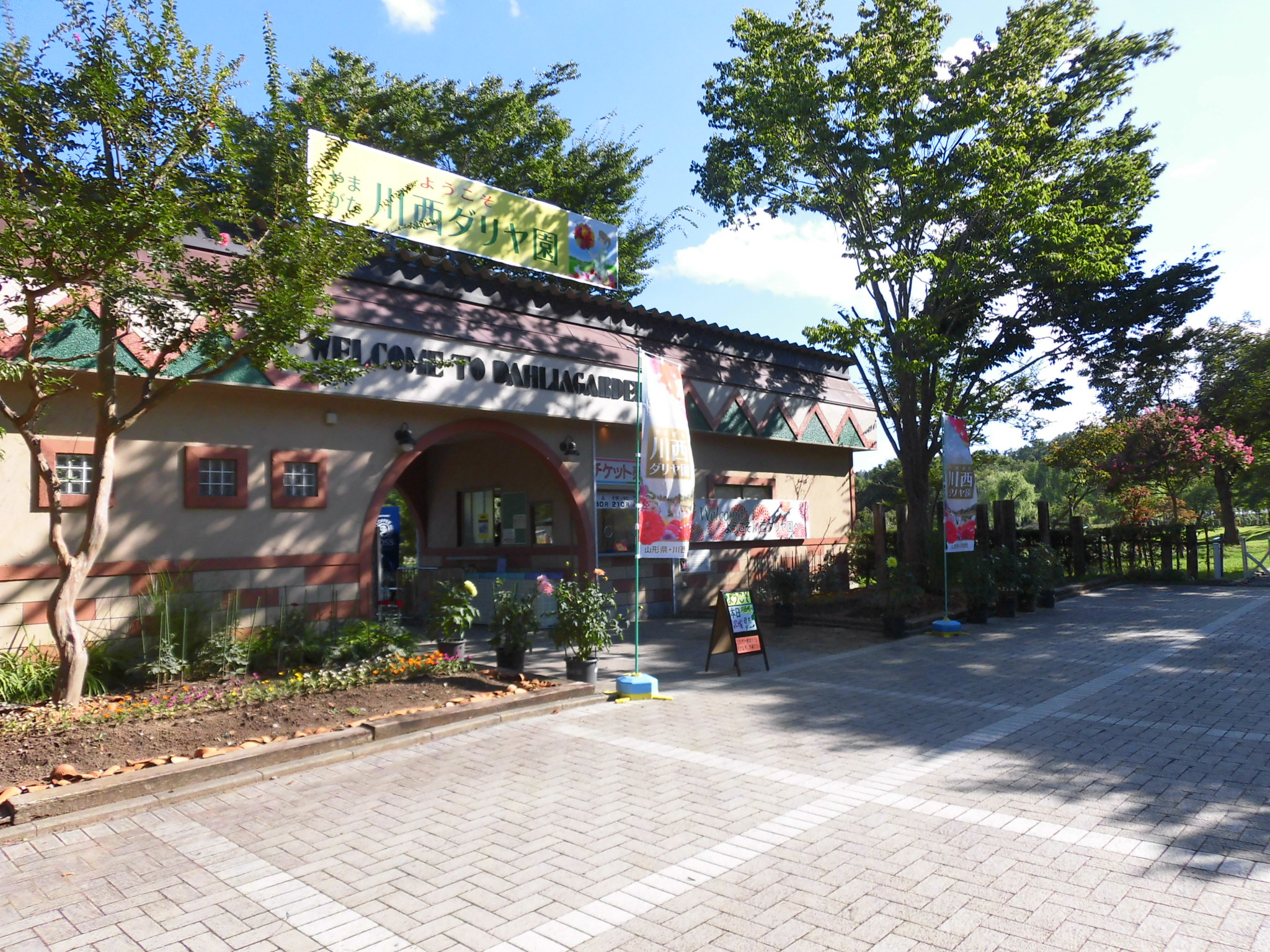 川西ダリヤ園。山形県東置賜郡川西町に所在。 公園入口建物。